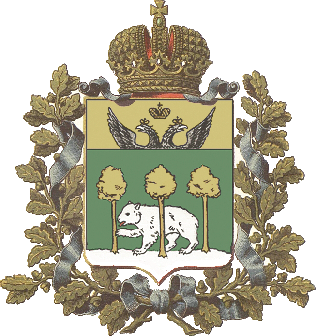 herb guberni chełmskiej